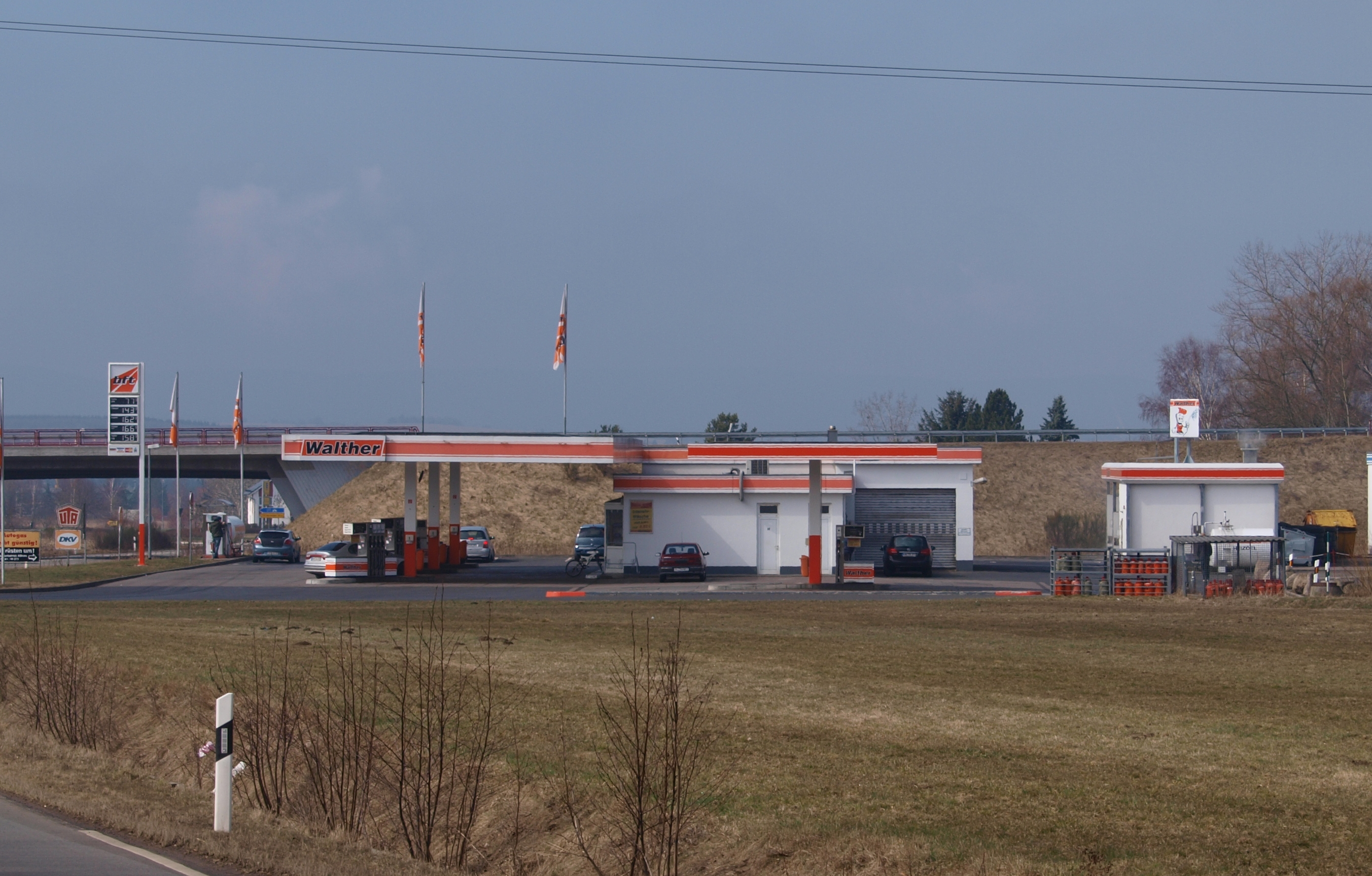 Walther-Tankstelle in Barchfeld